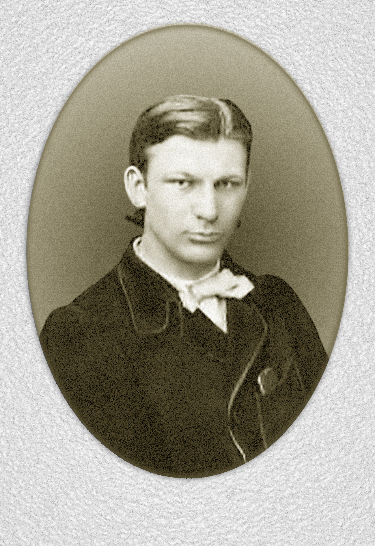 доктор медицины Кербер Бернгард Августович